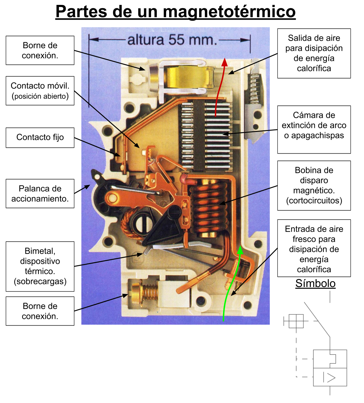 Foto descriptiva de la sección de un magnetotérmico.